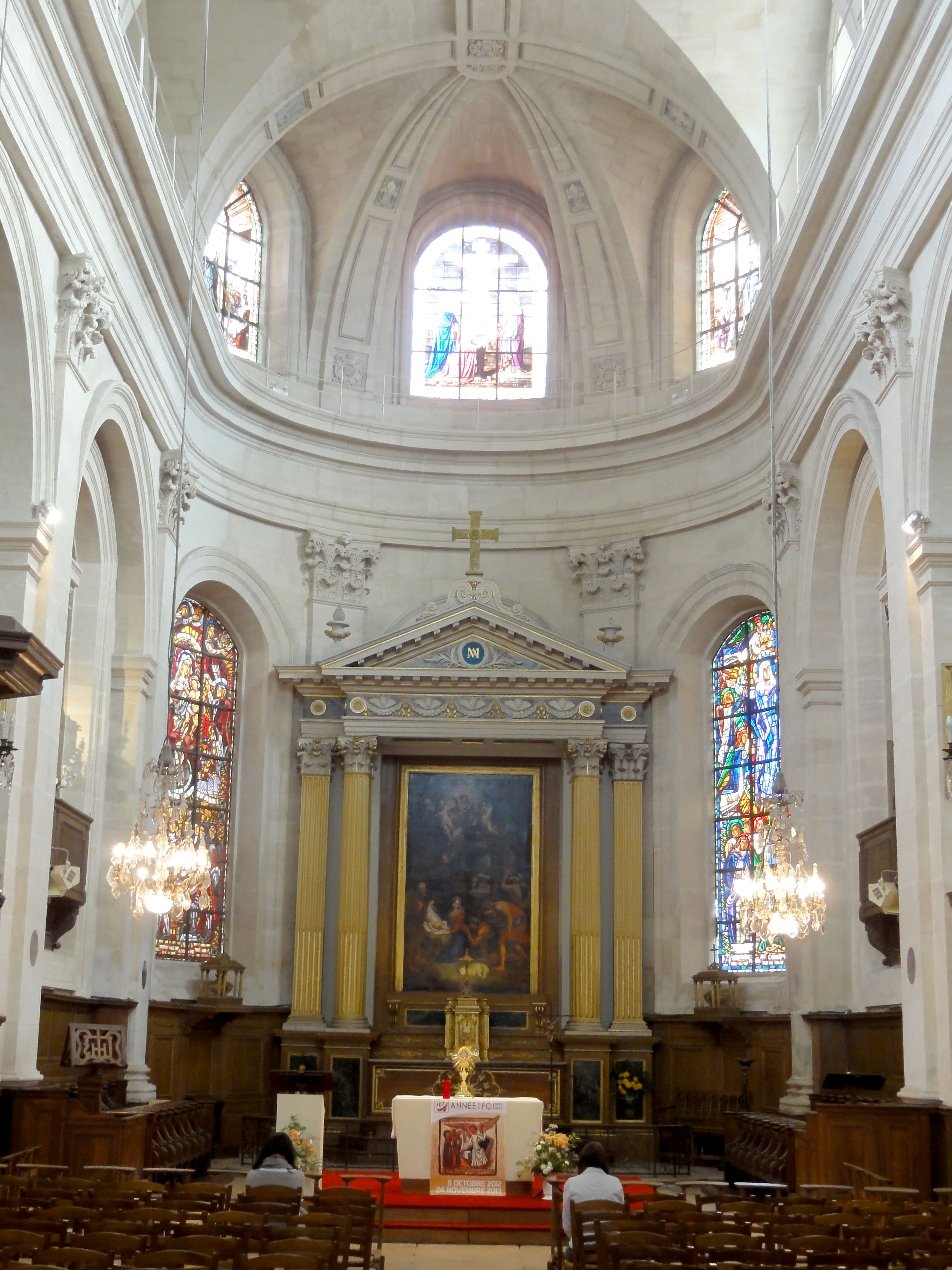 Nef, vue vers l'est.